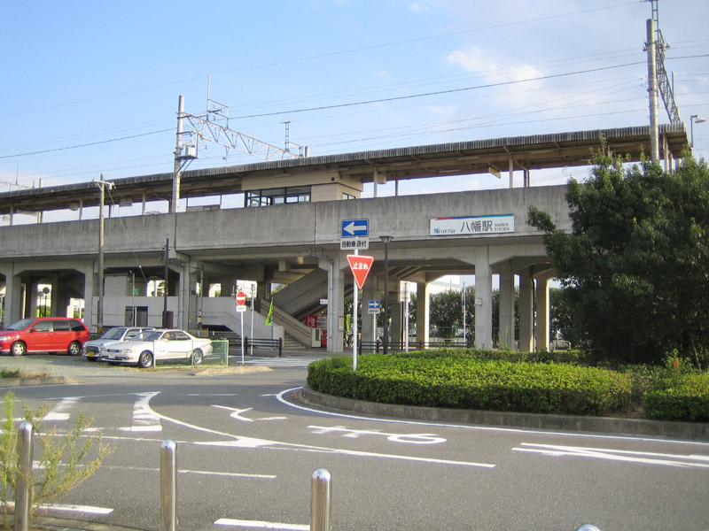 Yawata Station (八幡駅), Aichi, Japan